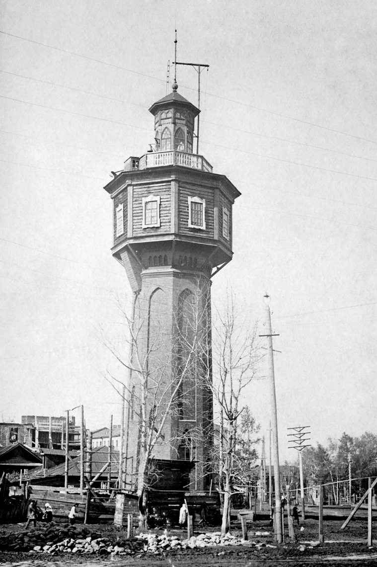 Белорецкая водонапорная башня